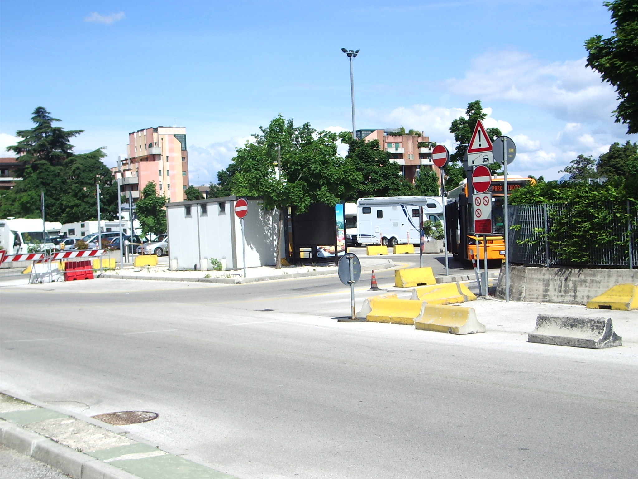 Parcheggio d'interscambio Cricoli